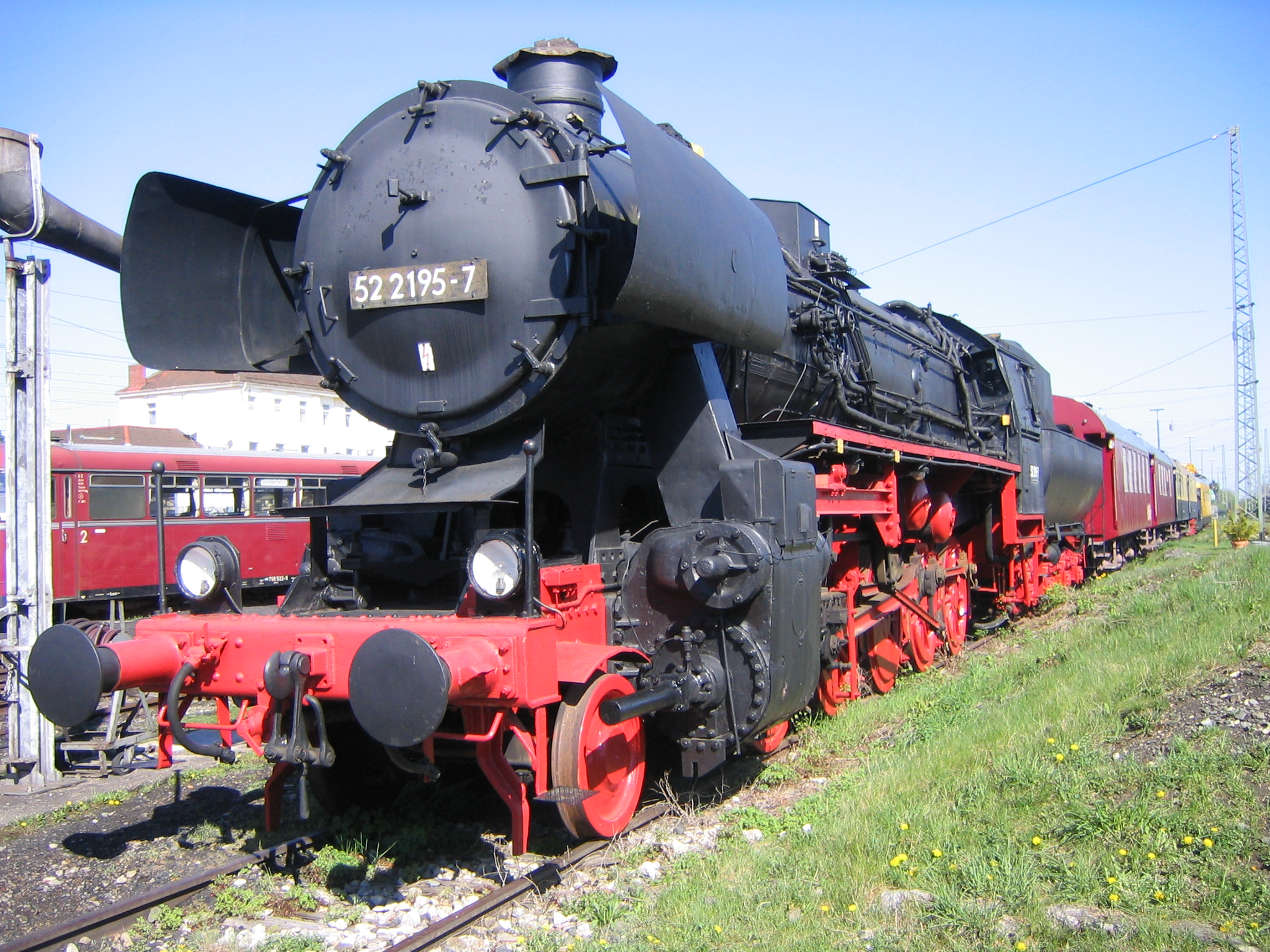 Dampflokomotive 52 2195 im Bayerischen Eisenbahnmuseum in Nördlingen.